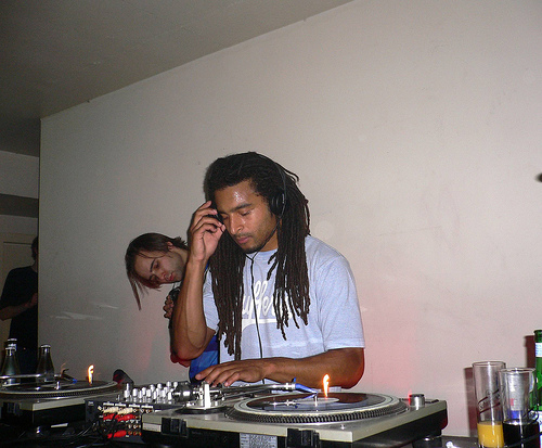 Mala of Digital Mystikz in Dusseldorf.